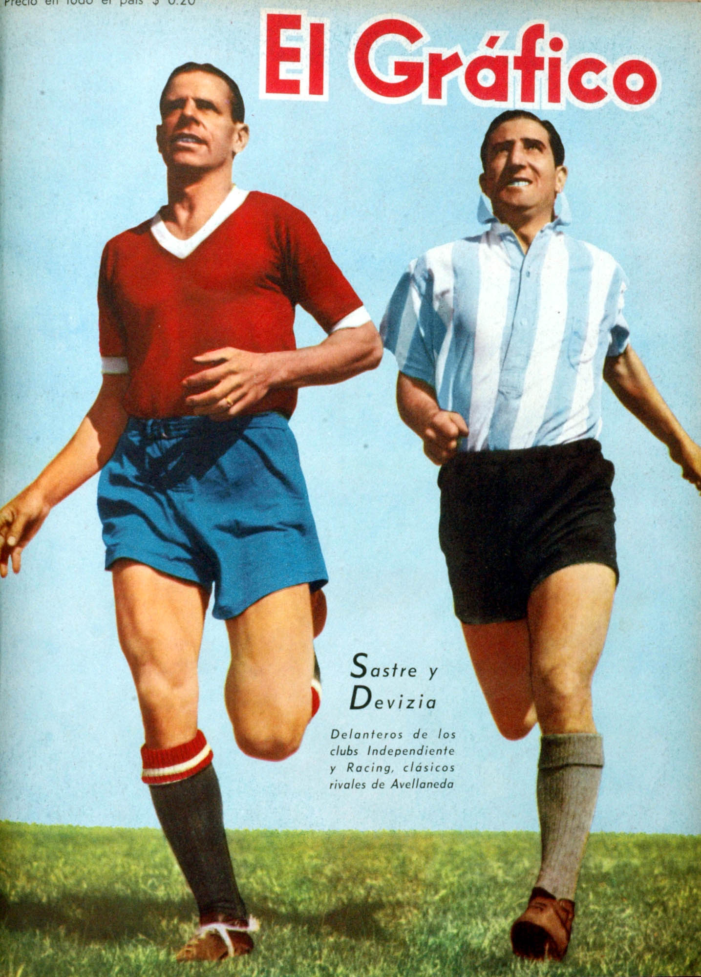 El Grafico del 24 de Abril de 1942. Edicion 1189